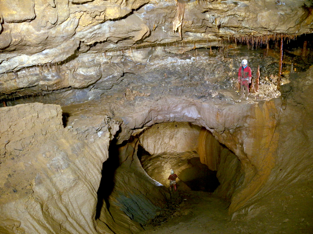 Geomorfologia. "Kraterra" Goikoetxe koban (Busturia, Bizkaia).